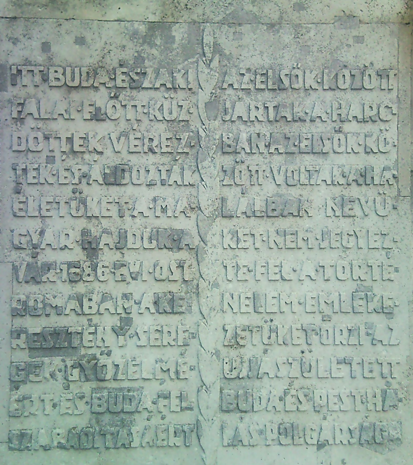 Magyar hajdúk emlékére emléktábla, Budapest I. kerülete, Északi várfal - Lovas utca. Szobrász: Grantner Jenő.